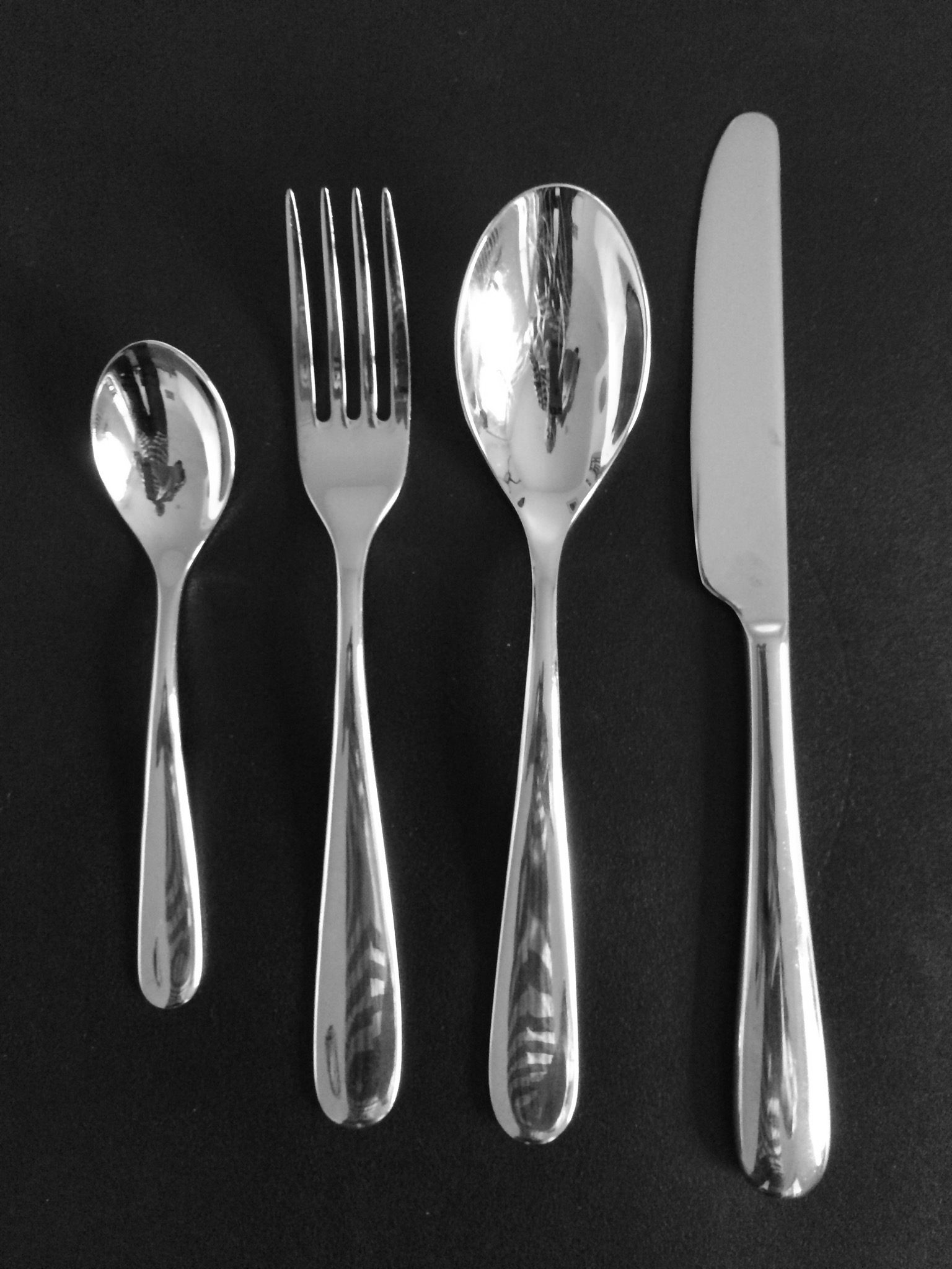 Besteck Nuovo Milano